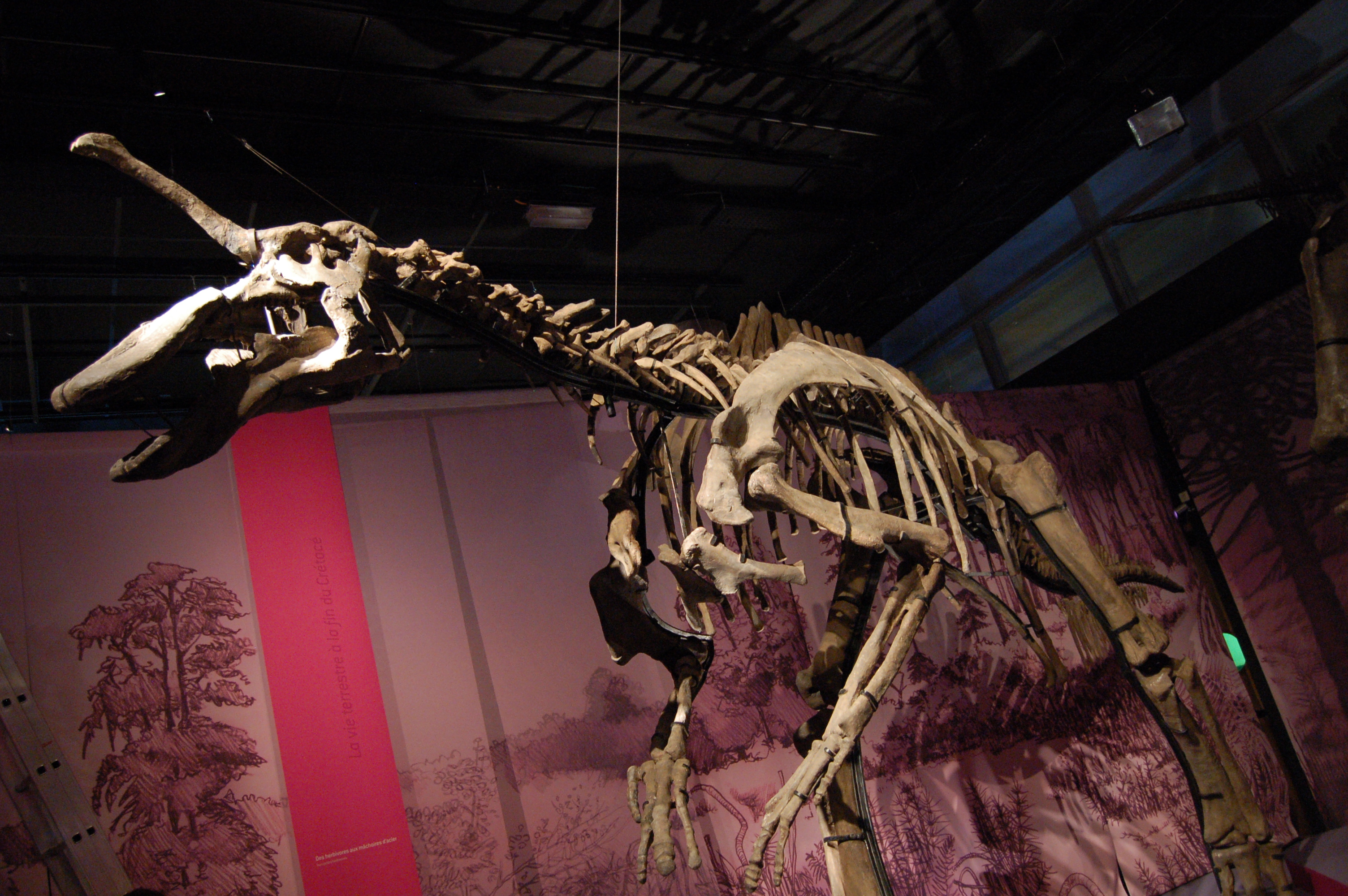 Tsintaosaurus